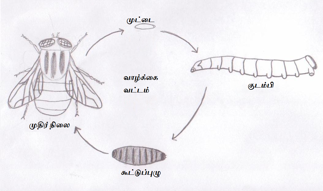 பூச்சியொன்றின் வாழ்க்கை வட்டத்தைக் காட்டும் வரிப்படம்